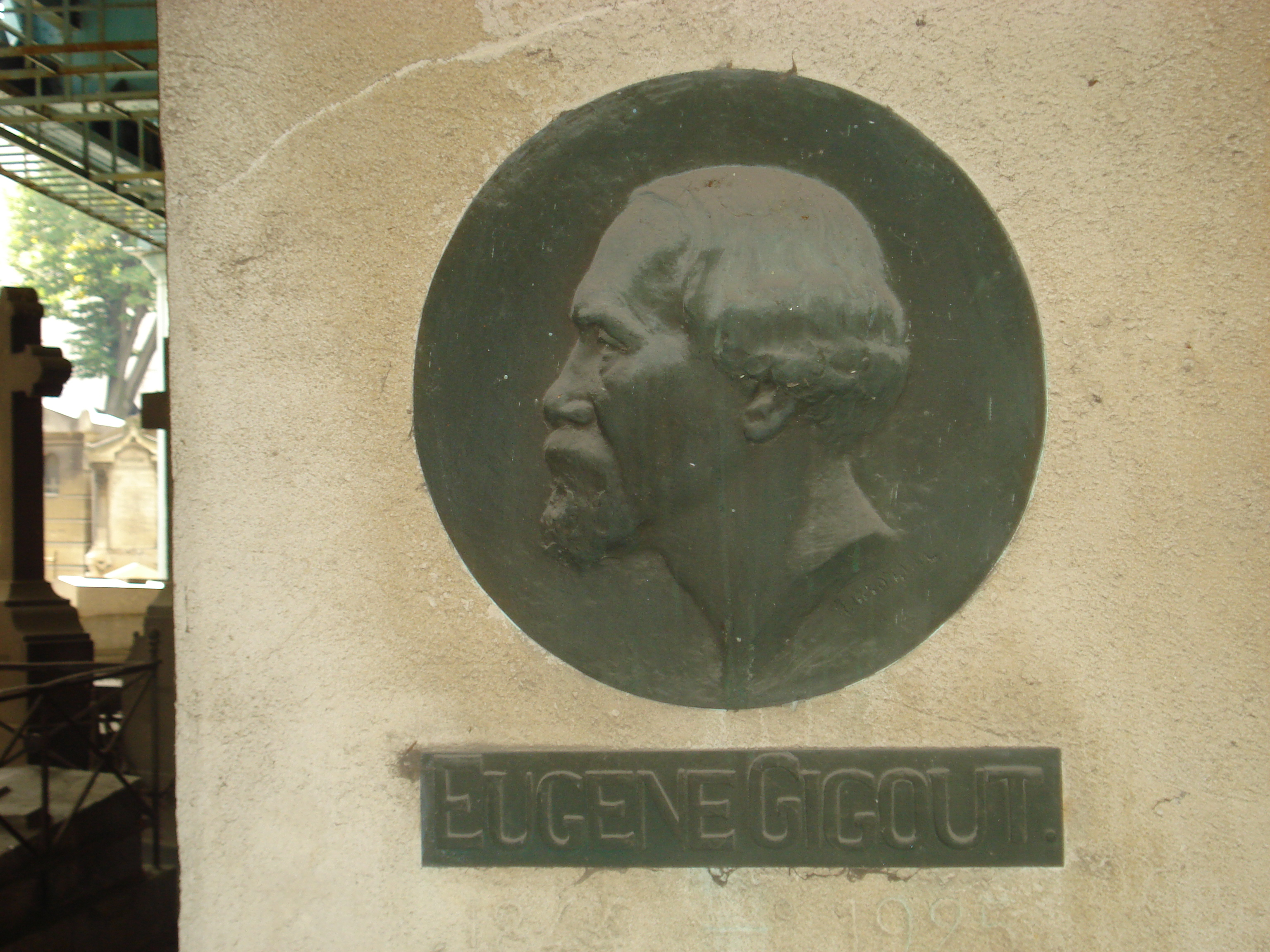 Eugène Gigout, né à Nancy le 23 mars 1844 et mort à Paris le 9 décembre 1925, est un compositeur et organiste français. Léon Boëllmann, né le 25 septembre 1862 à Ensisheim en Alsace, et mort le 11 octobre 1897 à Paris, est un organiste et compositeur français. Il a notamment composé la Suite Gothique pour l'orgue, comprenant la célèbre Toccata. Ils sont inhumés avec leurs épouses : Caroline-Mathilde Niedermeyer (1842-1890), fille du compositeur Louis-Abraham Niedermeyer Louise-Victoire-Mathilde Lefèvre (1866-1898), fille du compositeur Gustave-Victor Lefèvre Le médaillon en bronze est l’œuvre du graveur Naoum Aronson. (1872–1943) Le monument fut inauguré le 30 mai 1931